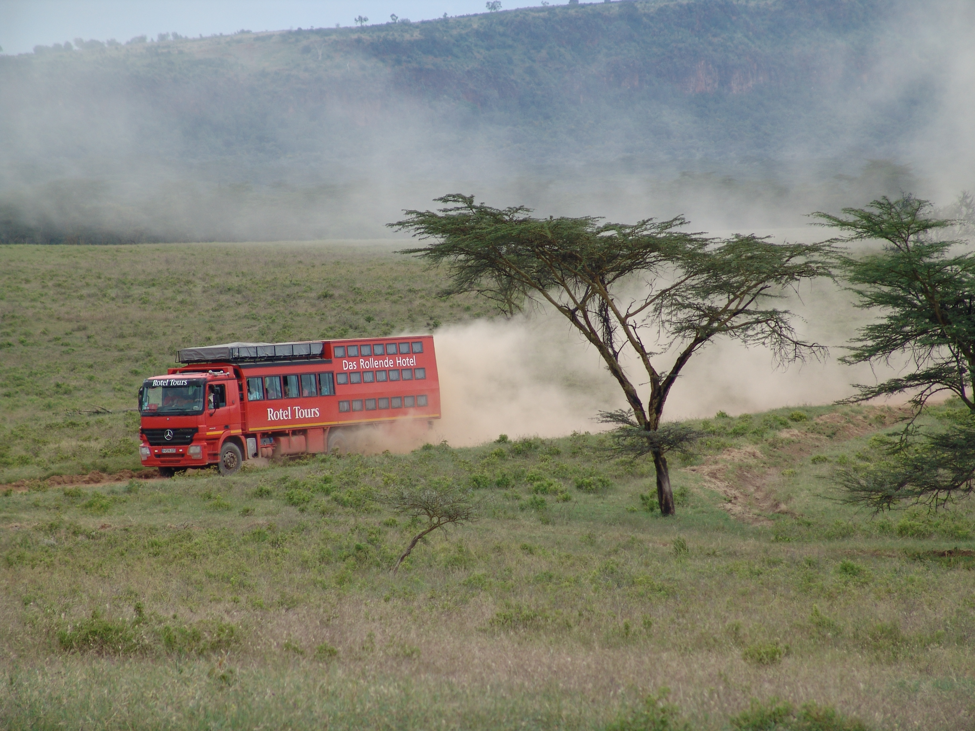 Rotel-Bus